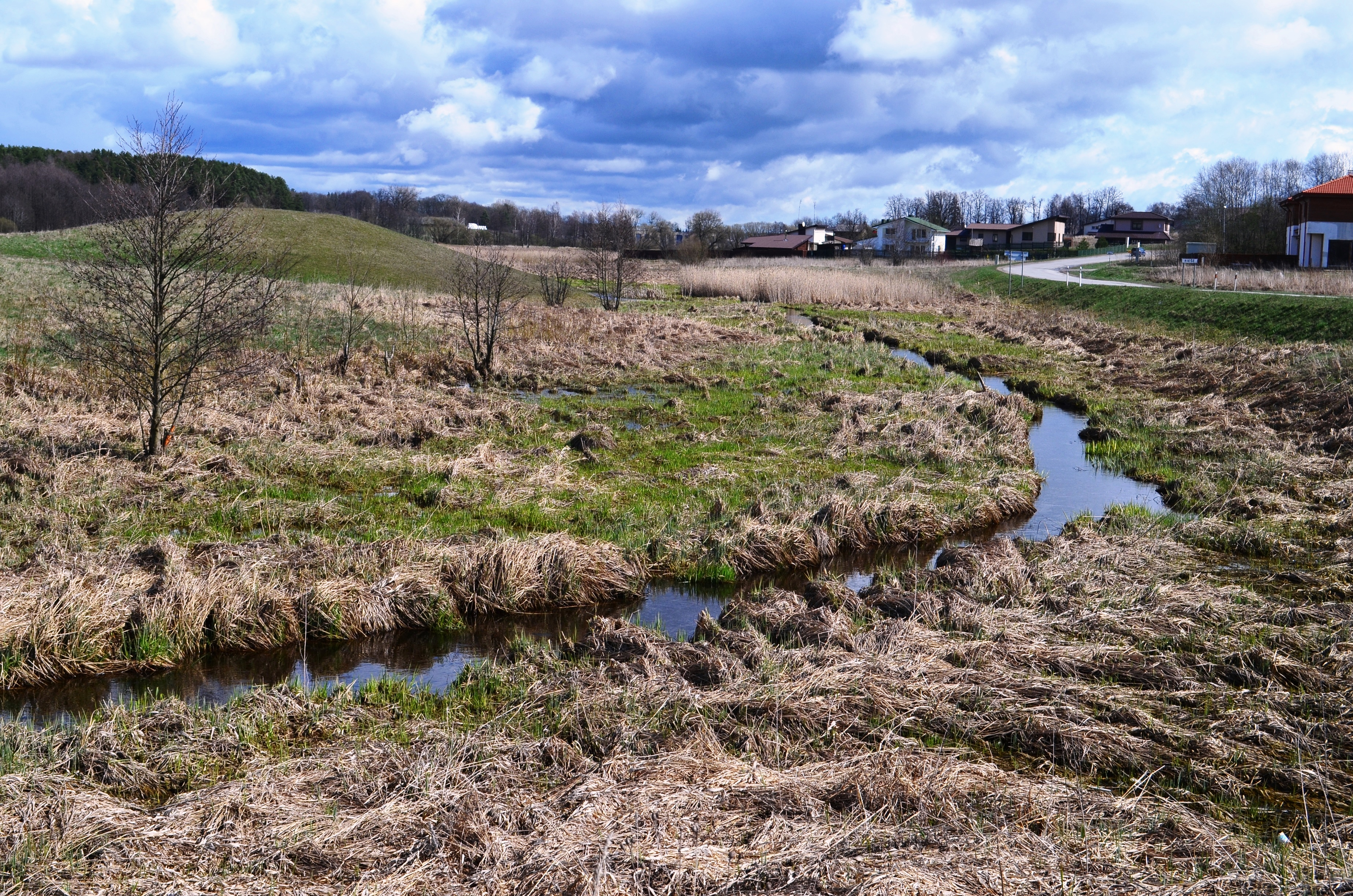 Riešės upė ir Riešės k., Vilniaus raj.